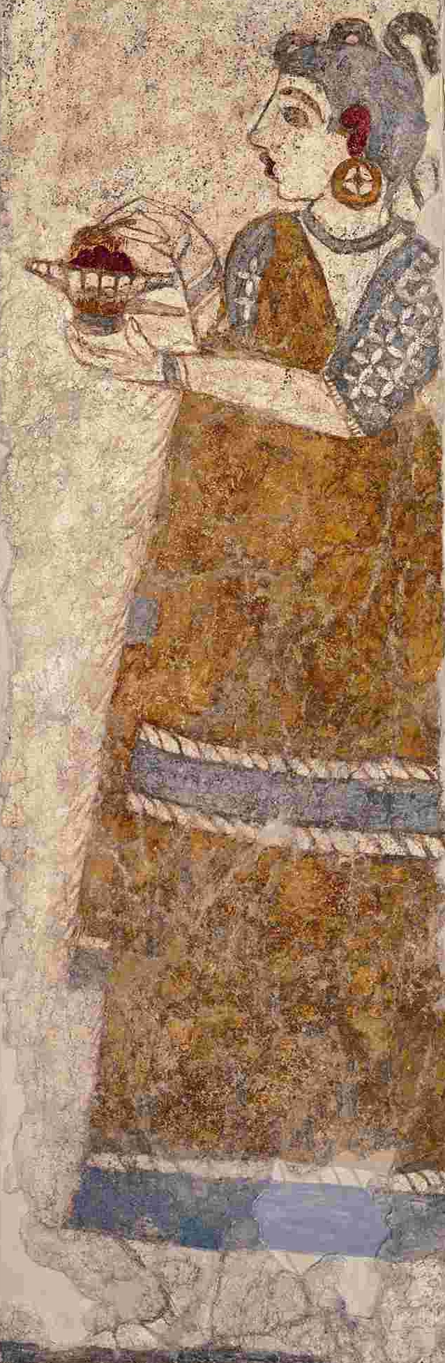 Fresko einer Priesterin aus dem Durchgang von Raum 4 zu Raum 5 im Obergeschoss des Westhauses der Ausgrabungsstätte in Akrotiri auf Santorin, Kykladen, Griechenland